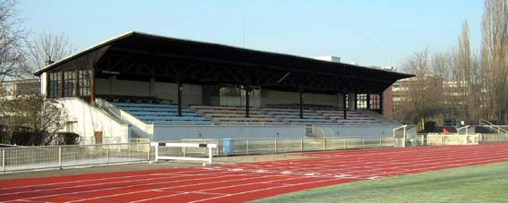 Stadion an der Berliner Straße Wiesbaden - Tribüne